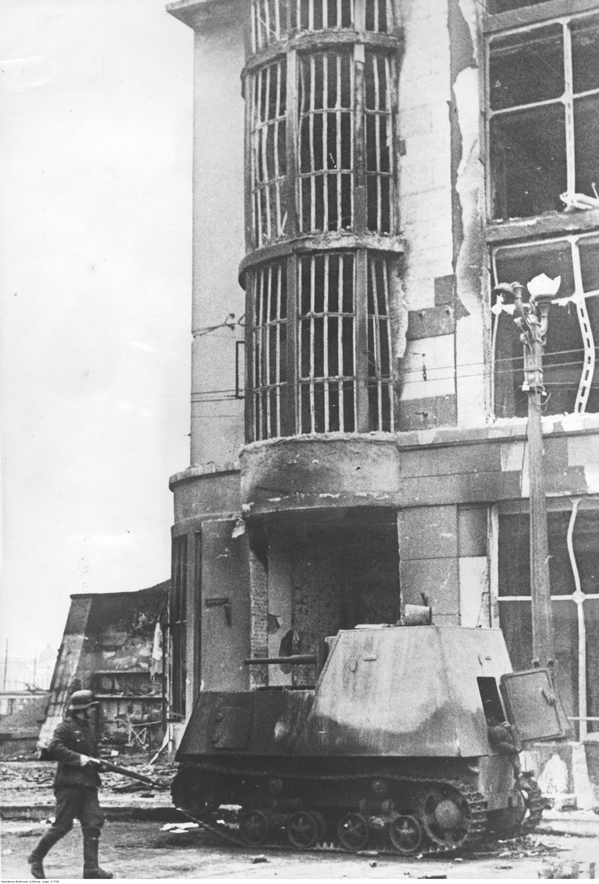 Charków po zajęciu przez wojska niemieckie. Przed zniszczonym budynkiem stoi radzieckie działo samobieżne wykonane z przerobionego ciągnika.